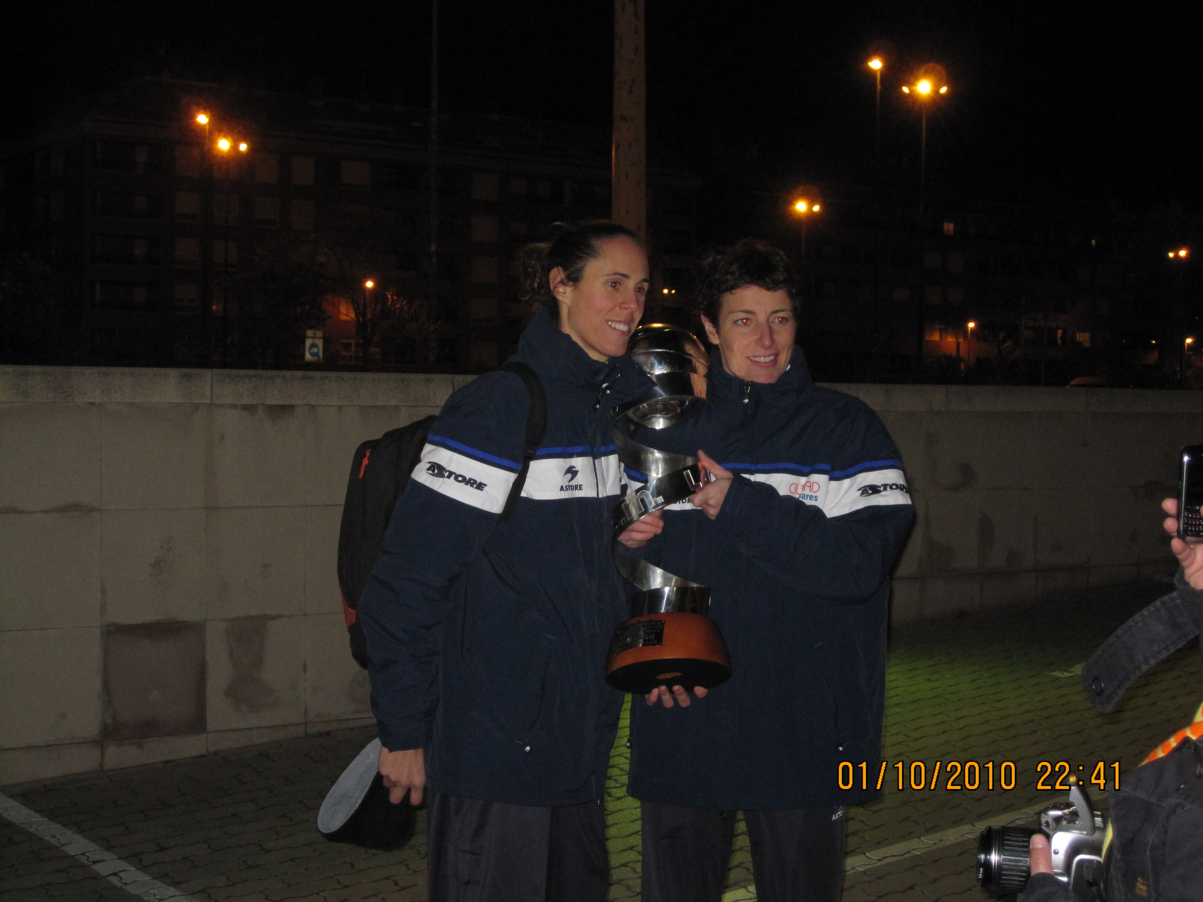 Las jugadoras d baloncesto españolas Amaya Valdemoro y Elisa Aguilar posan con la Copa de la Reina q ganaron en Zaragoza en 2010.